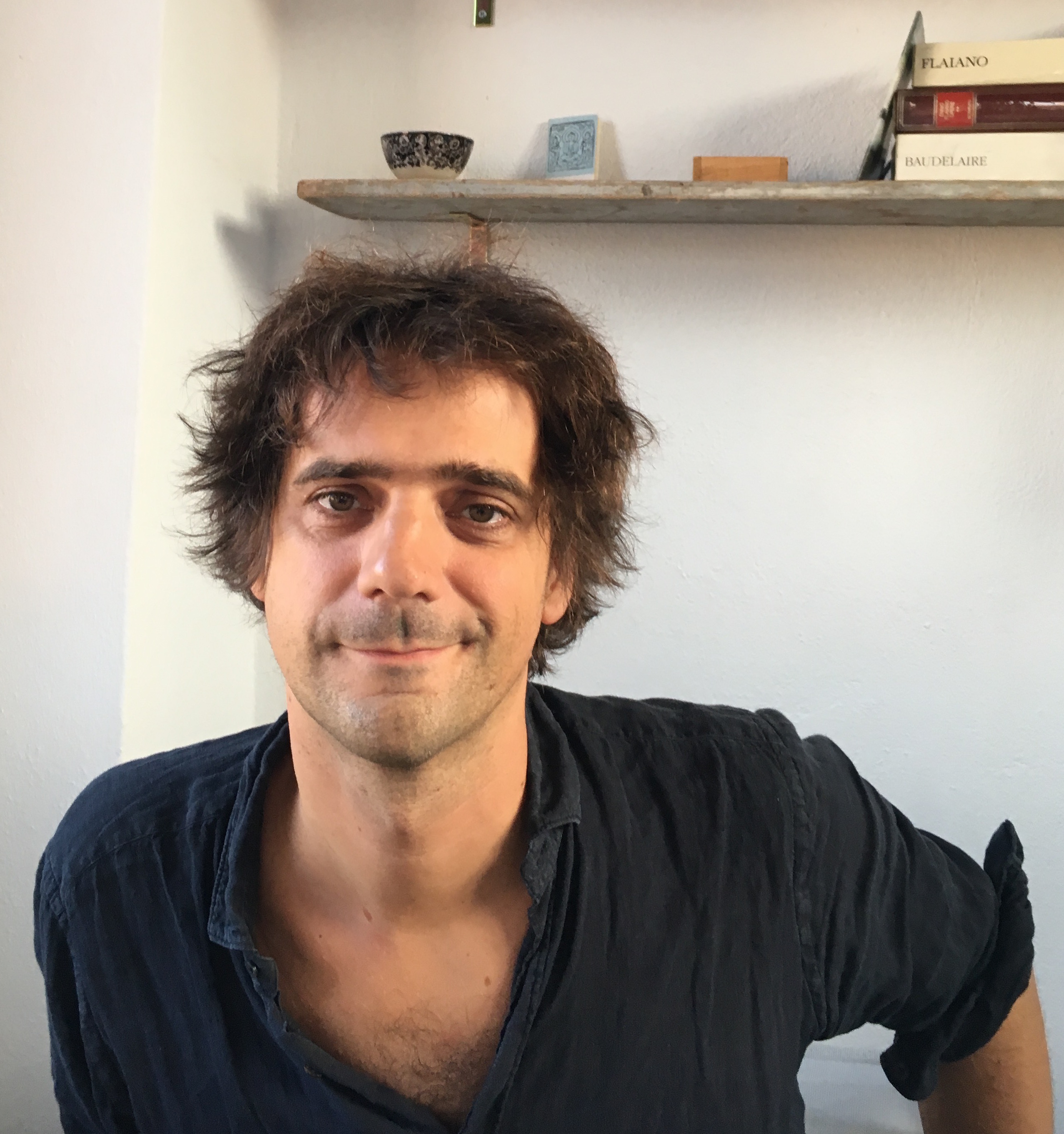 Marco Pettenello